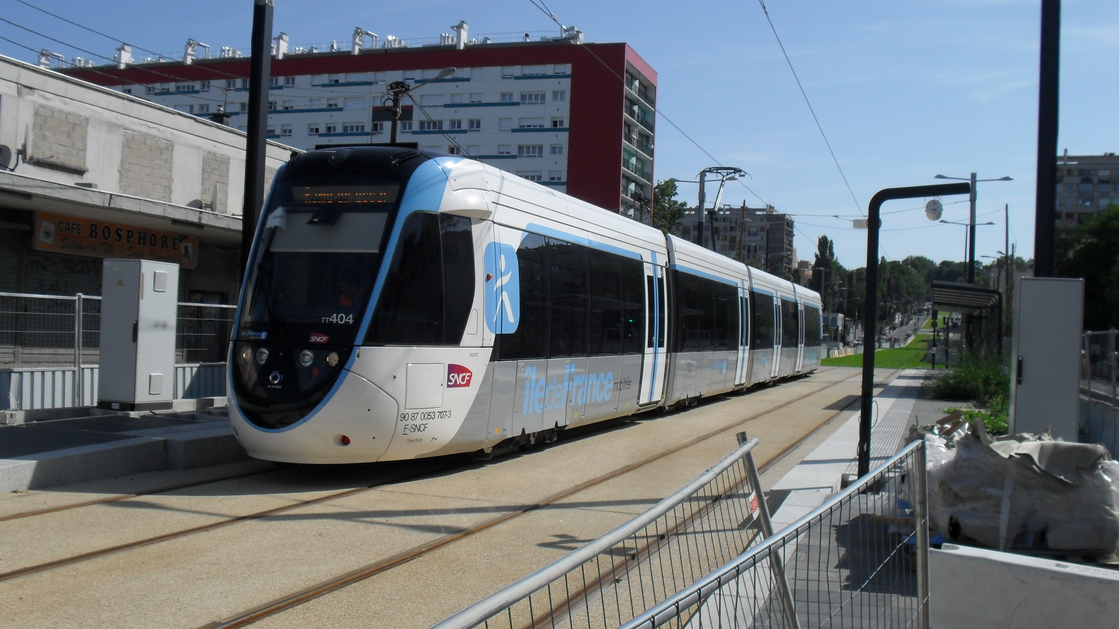 Tram-train U53700 en essais à la future station Maurice Audin